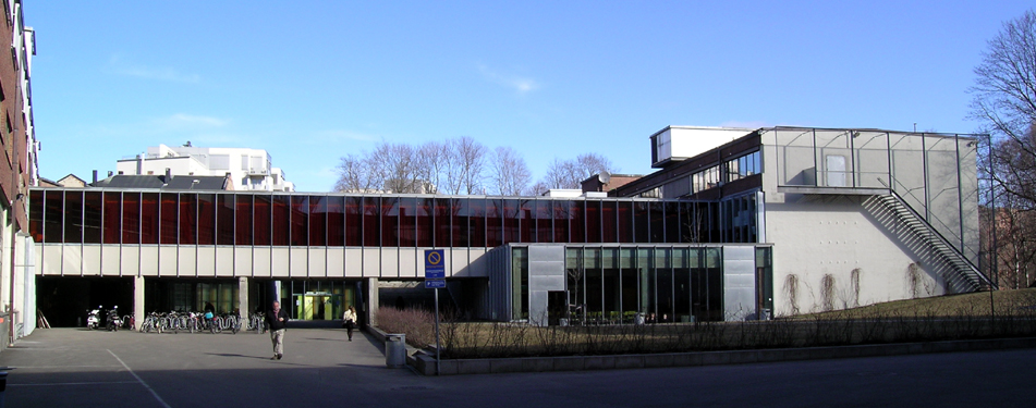 Arkitektur- og designhøgskolen i Oslo, Maridalsveien 29.